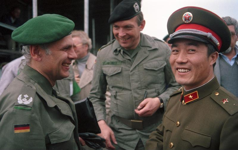 23.9.1986 Mitarbeiter des Bundespresseamtes beobachten das Herbstmanöver "Fränkischer Schild" der Bundeswehr- mit Beteiligung zahlreicher Soldaten aus NATO-Mitgliedsstaaten sowie eines französichen Großverbandes - Im Raum Würzburg.